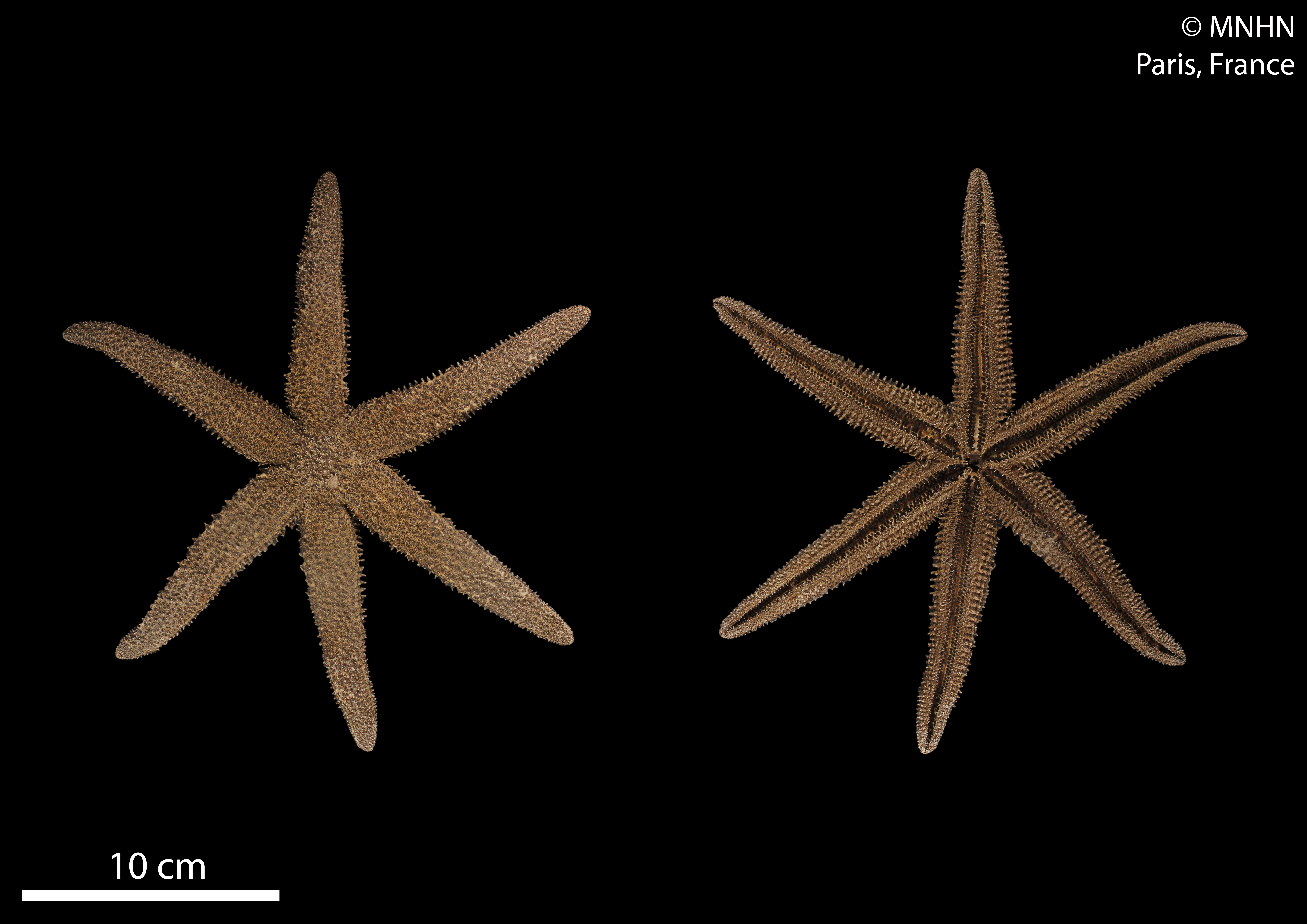 Leptasterias polarisSpécimen MNHN-IE-2013-10392, sous la dénomination Asterias borealis Perrier, 1875Collection : Échinodermes (IE)Muséum National d'Histoire Naturelle (Paris, France) Origine : Localité/Lieu-dit : Caribou Localité originale : Terre du Labrador Date de récolte : 1864-01-01/1864-12-31